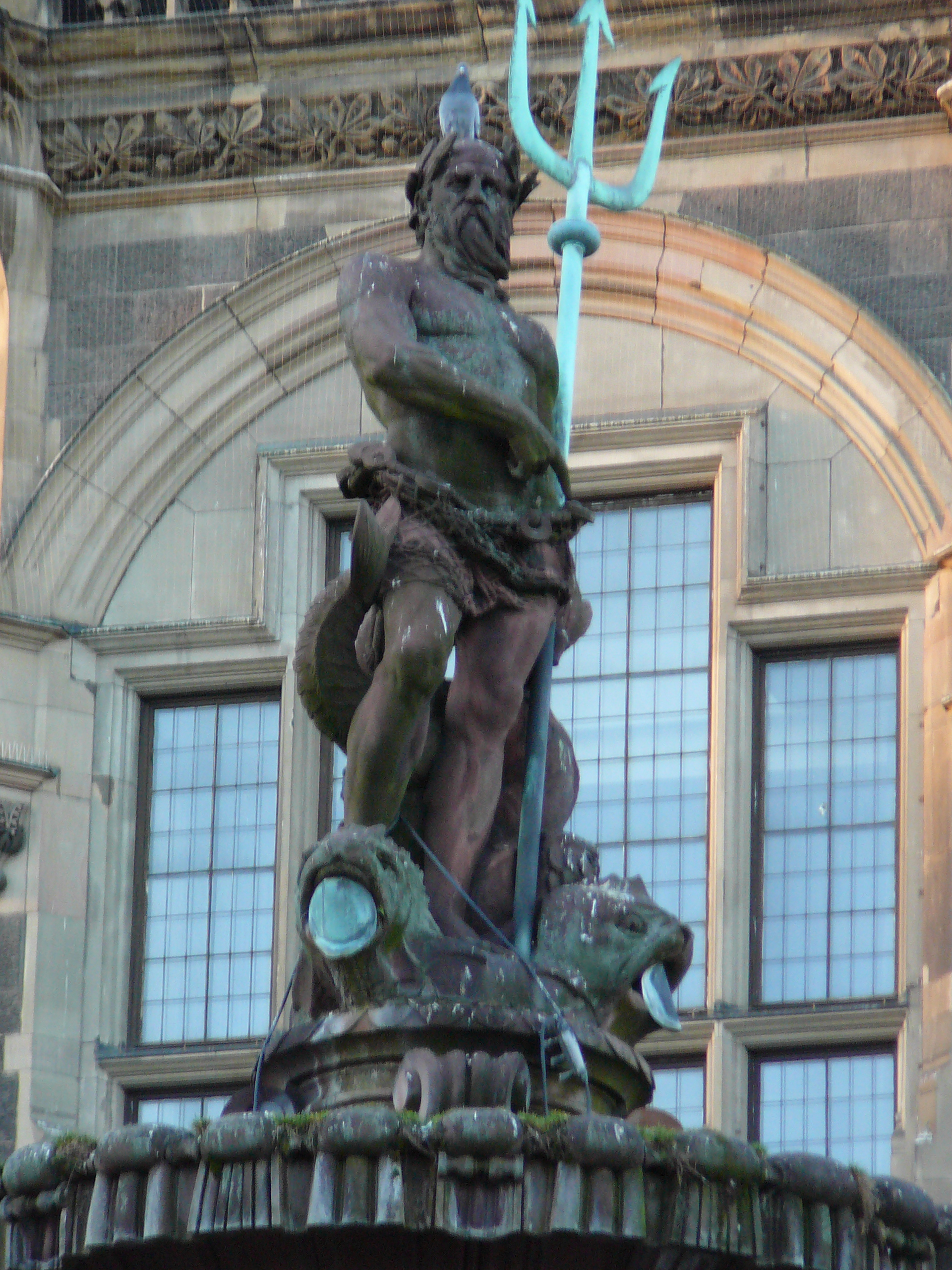 Jubliläumsbrunnen, Neumarkt, Wuppertal